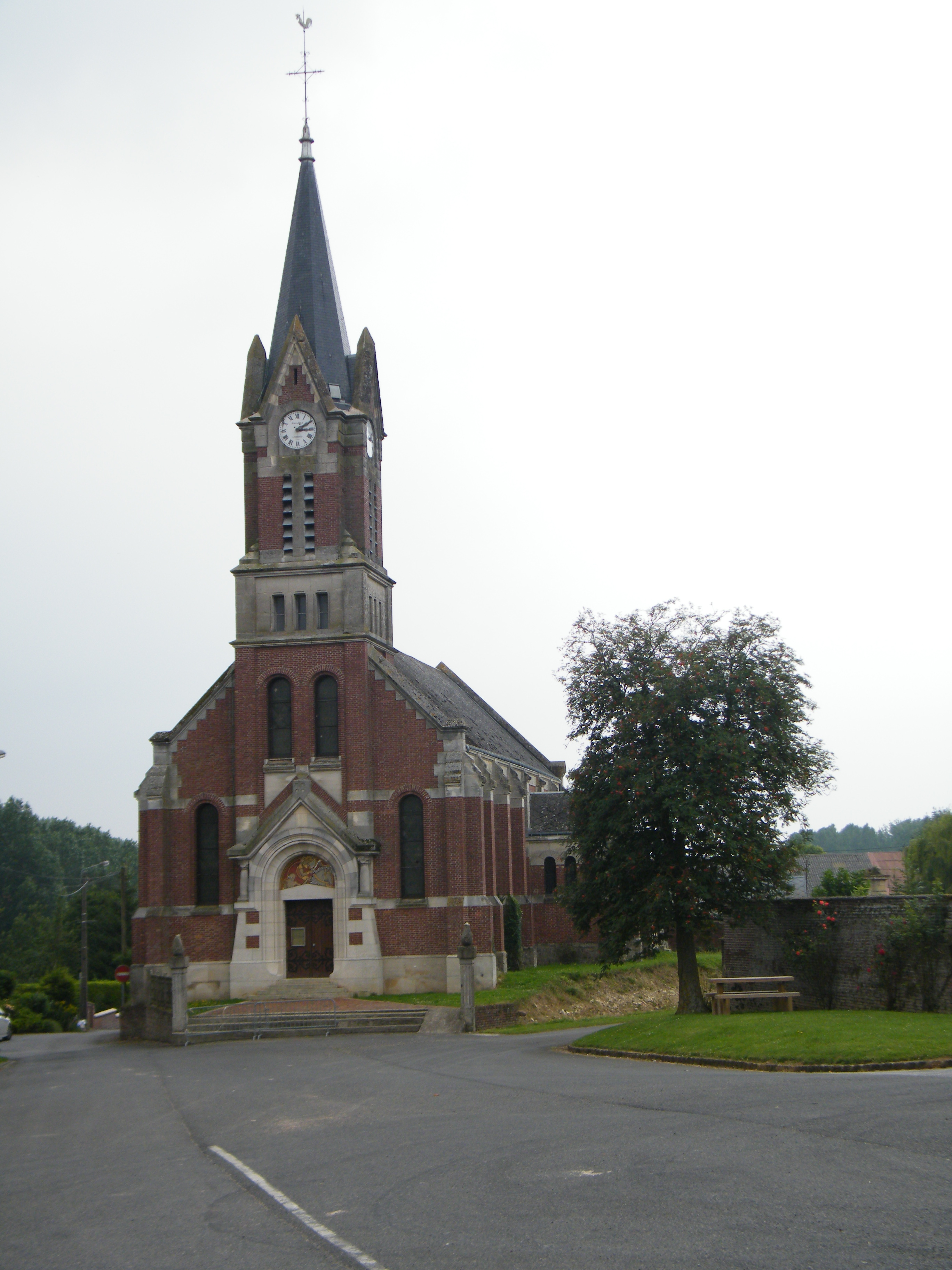 Église Saint-Martin.